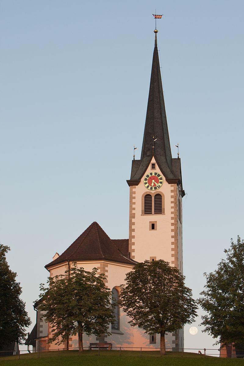 Kirche von Stein (AR) im Morgenlicht nach einer Vollmondnacht